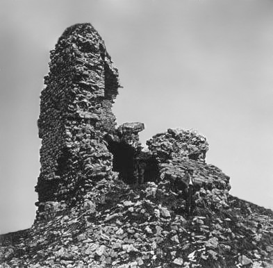 Runes del castell de Milany amb un home. Santiago Perdigó i Díaz Caneja (1921)